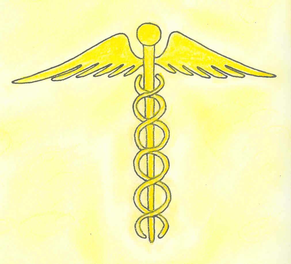 Zelfgemaakt, geen auteursrechten